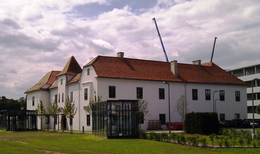 Moserhofschlössl (Messeschlössl), Graz-Jakomini. (Das Photo zeigt trotz des Dateinamens nicht das Hallerschloss!)